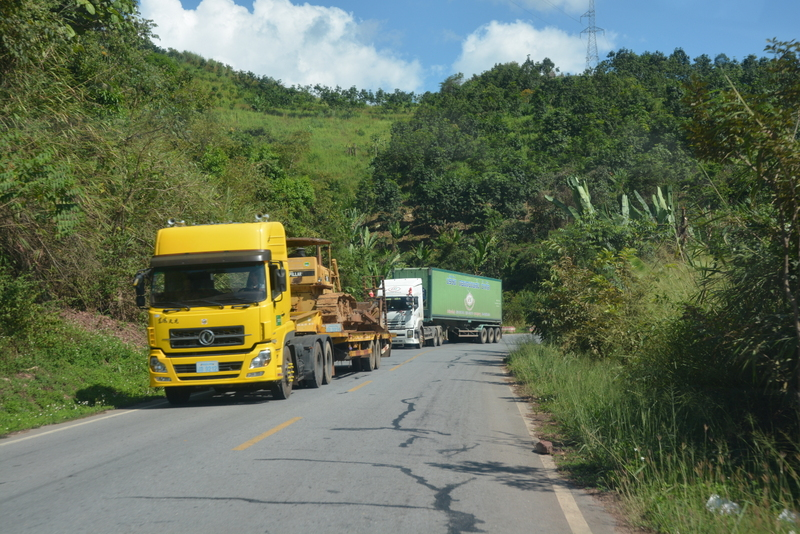 nanboku kairou